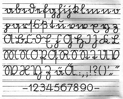 Deutsche Sütterlin-Ausgangsschrift, ab 1924